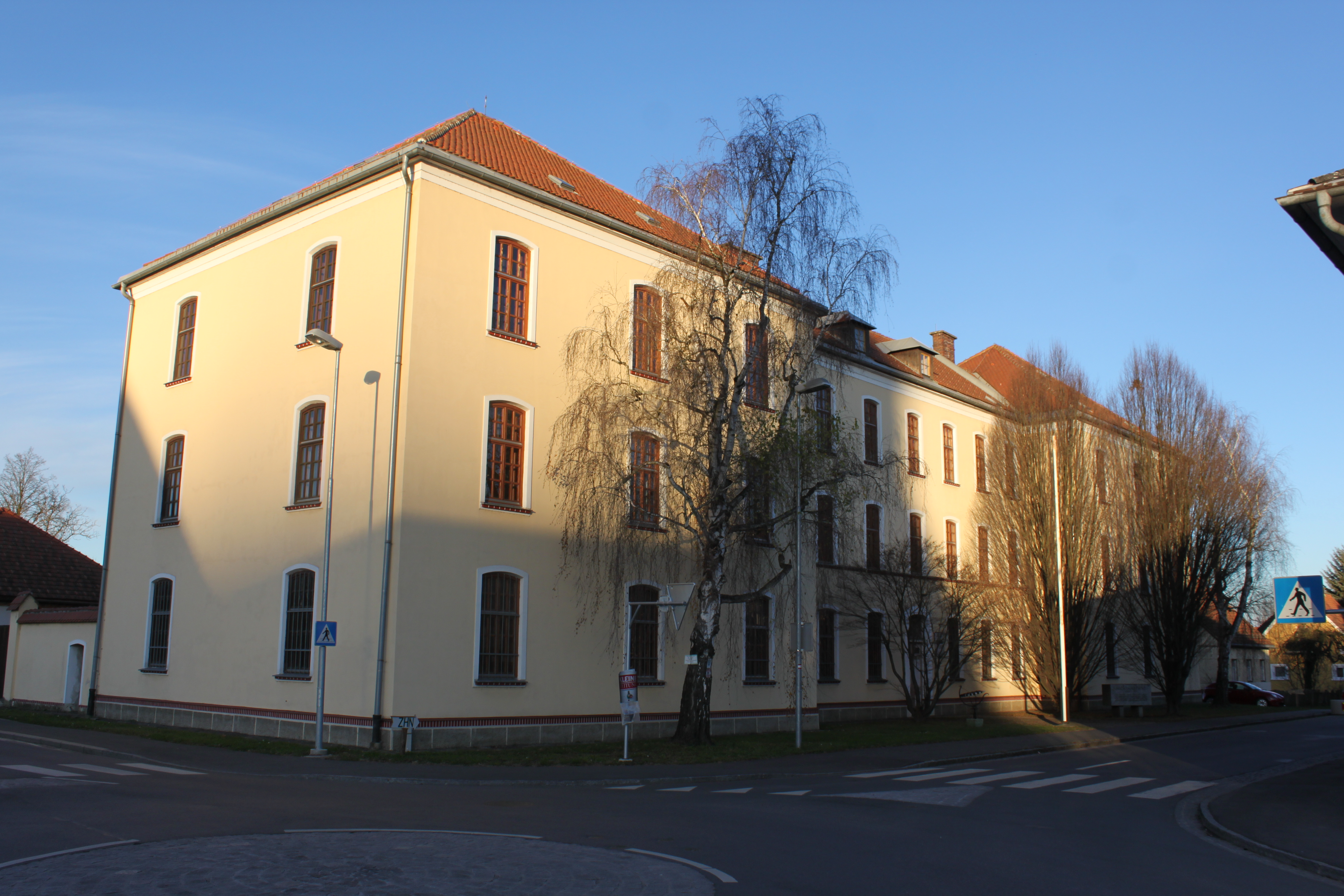 Mickl-Kaserne mit ehem. Stallungen, Hauptgebäude, links zur 69iger Umfahrung und rechts Hauptfront zur Plaschenaustraße